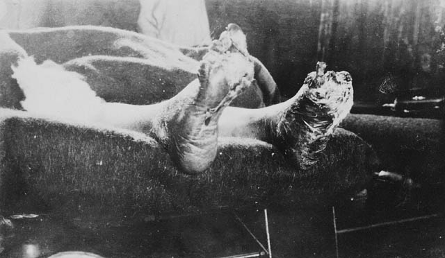 "Title / Titre :Case of trench feet suffered by unidentified soldier / Cas de pieds des tranchées (soldat non identifié) Creator(s) / Créateur(s) : Unknown / Inconnu Date(s) : 1917 Reference No. / Numéro de référence : 3192141 Location / Lieu : France Credit / Mention de source : Library and Archives Canada/PA-149311 / Bibliothèque et Archives Canada/PA-149311"